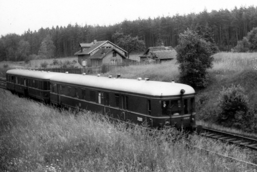 Dieseltriebwagen der BR 137... ? auf der Rhein-Main-Bahn vor dem Streckenwärterhaus 63 in der Nähe des Bahnhofs Messel